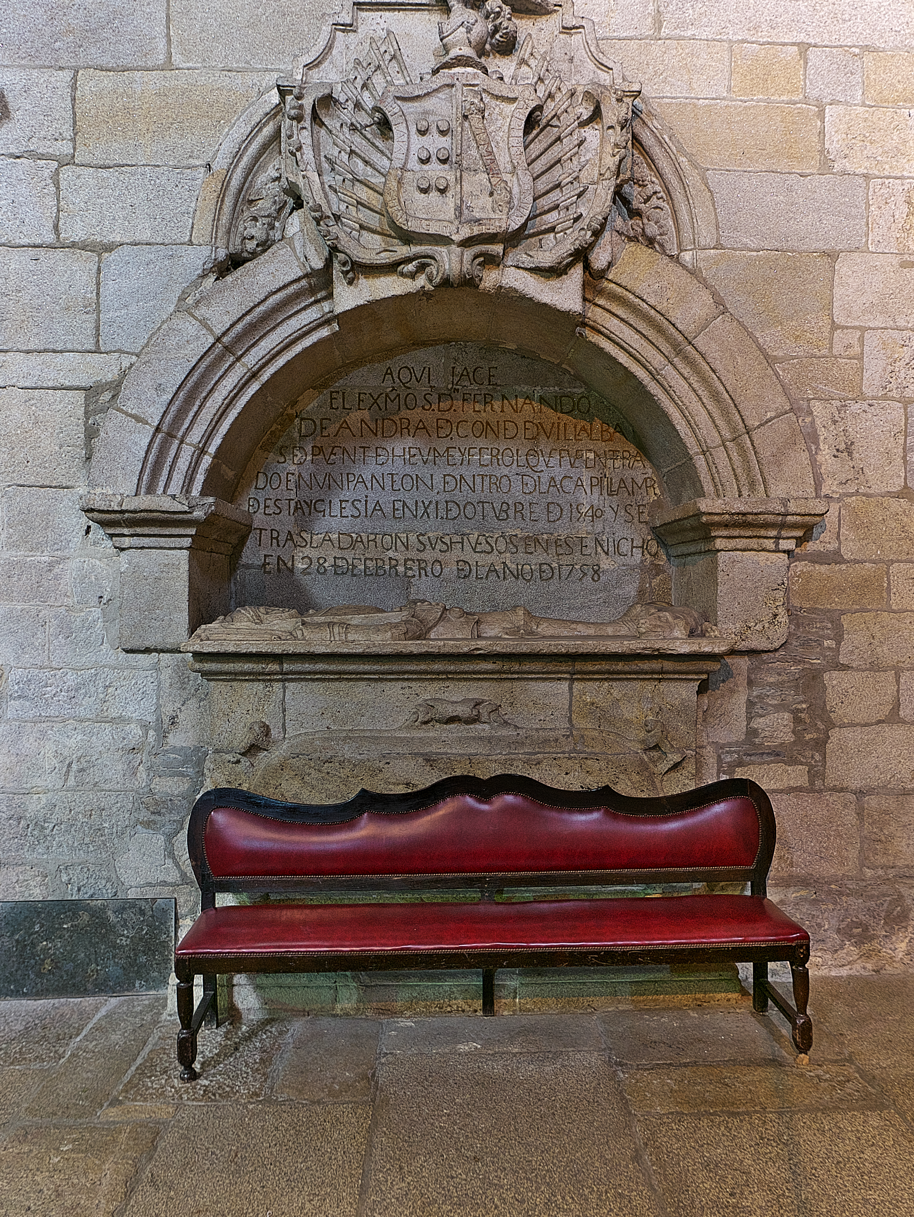 Iglesia de Santiago (Puentedeume). Sepulcro (ca. 1758) de Fernando de Andrade y Pérez de las Mariñas, VIII señor de Ferrol y de Puentedeume, II conde de Villalba y I conde de Andrade, señor de la Casa de Andrade, y de las Mariñas.